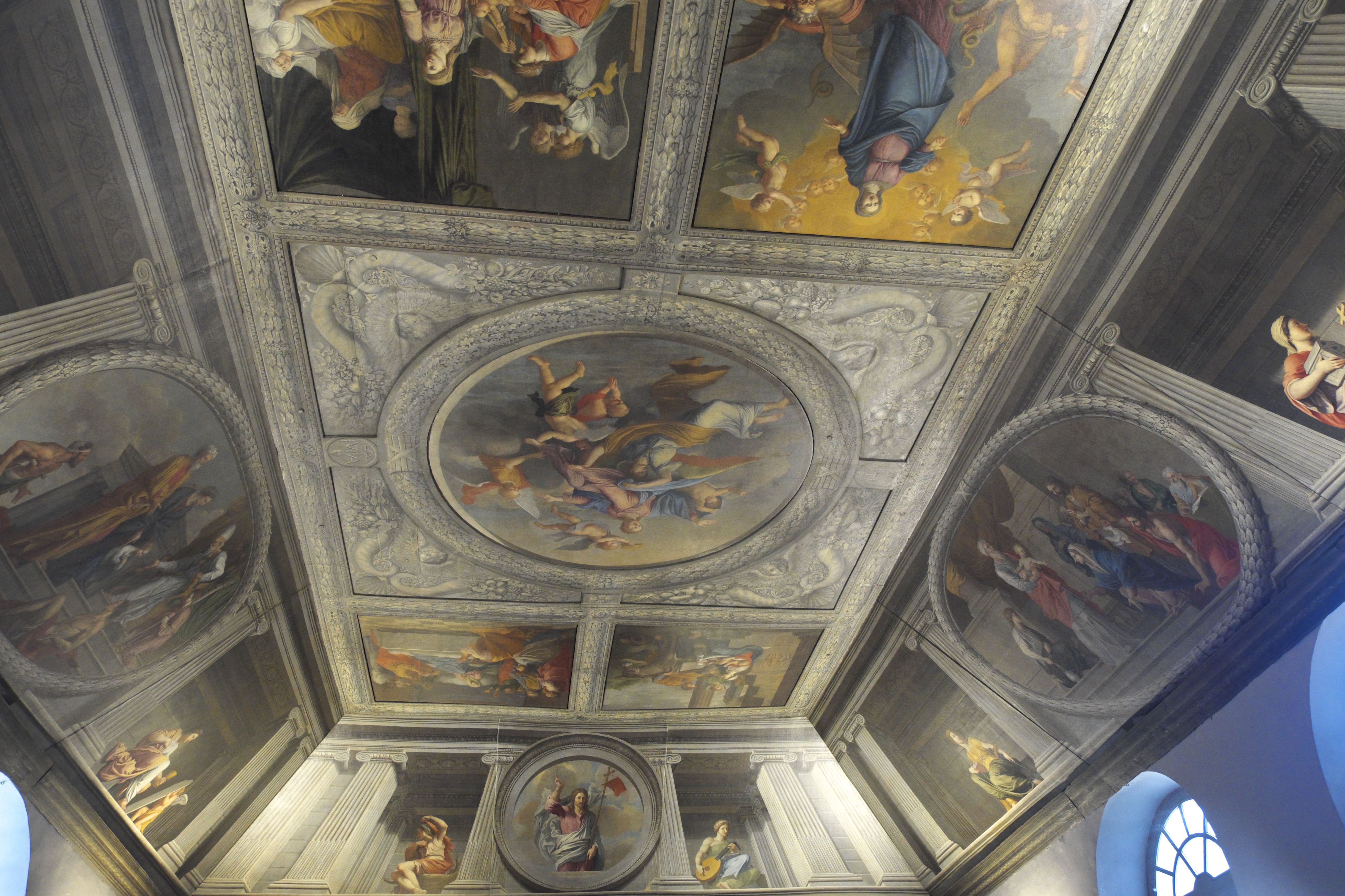 Kapelle Saint-Joseph, ehemalige Kapelle des Ordens von der Heimsuchung Mariens (Chapelle de la Visitation) in Moulins im Département Allier (Auvergne-Rhône-Alpes/Frankreich), Deckenmalerei aus dem 17. Jahrhundert, Rémy Vuibert zugeschrieben; Darstellung: Szenen aus dem Marienleben, Tugenden